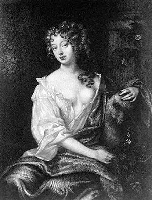 engraving